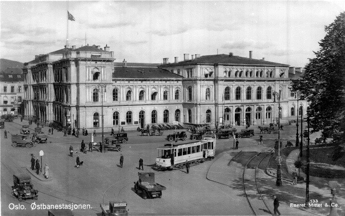 Østbanebygningen sett fra Christian Frederiks plass. Trikk, biler, hesteekvipasjer, drakjerrer. Jernbanetorget, Paléhagen. Postkort 133.